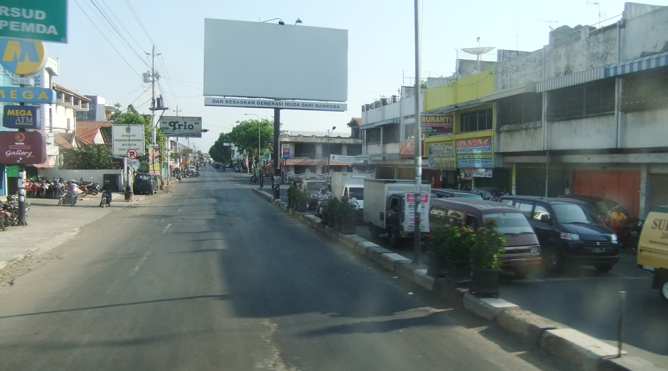 Kota Pekalongan